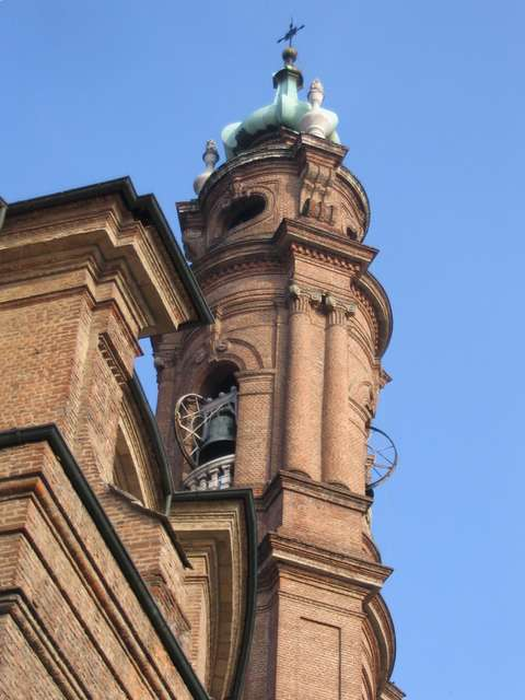 duomocarig3 - Duomo di Carignano (quello in provincia di Torino?)